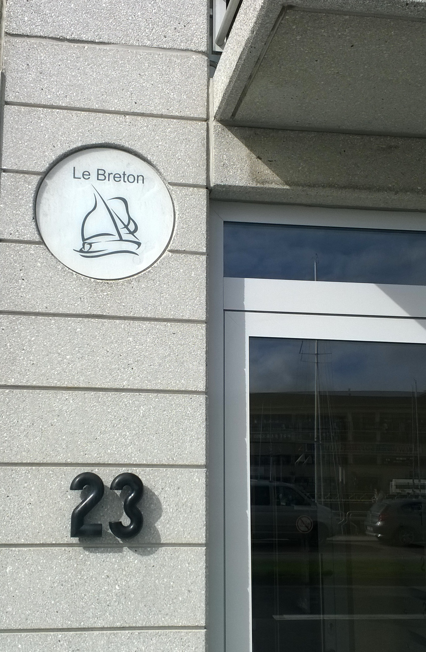 Naamplaat van het appartementsgebouw Le Breton, Vindictivelaan 23 te Oostende